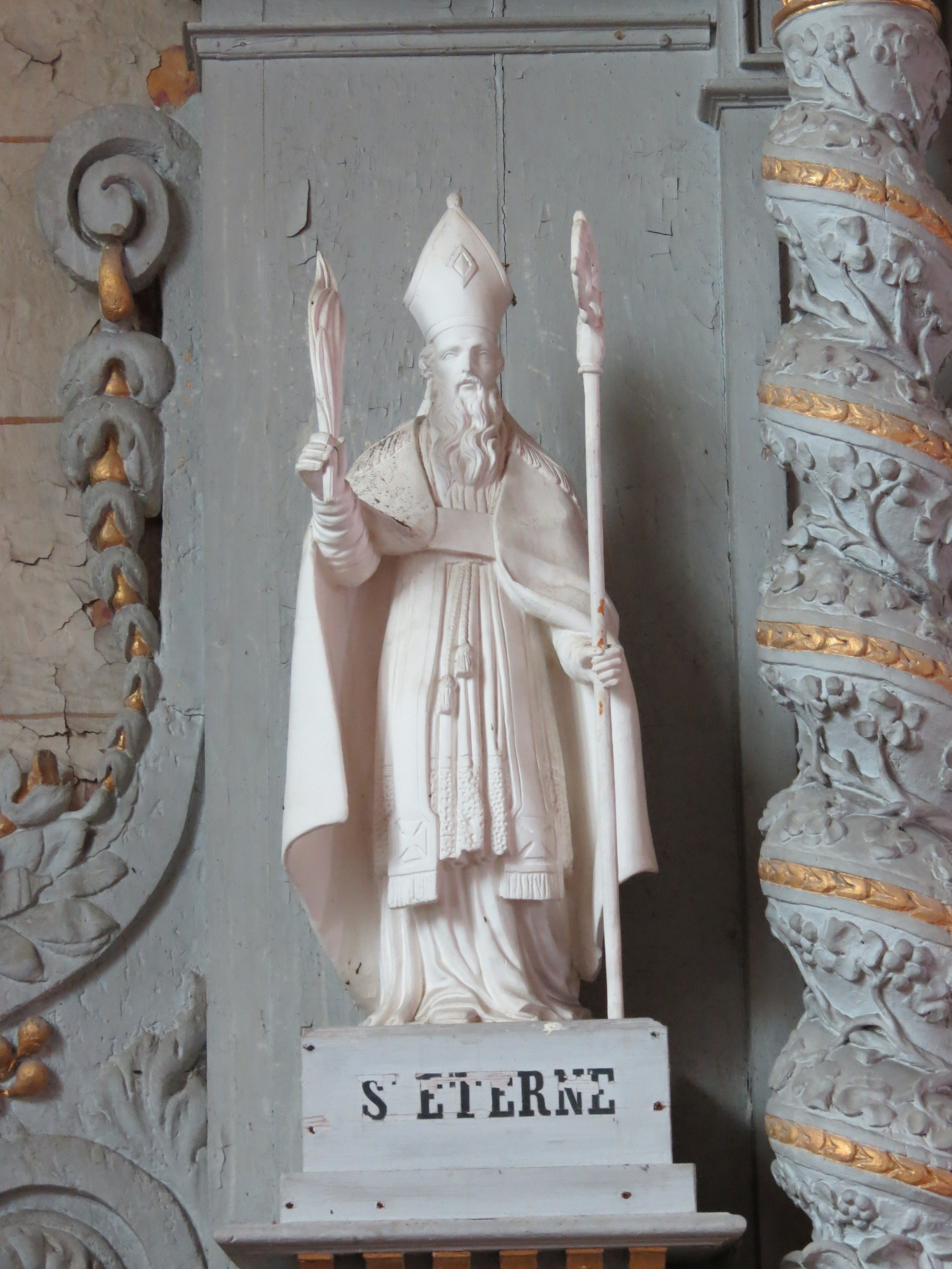 Statue de Saint-Éterne.